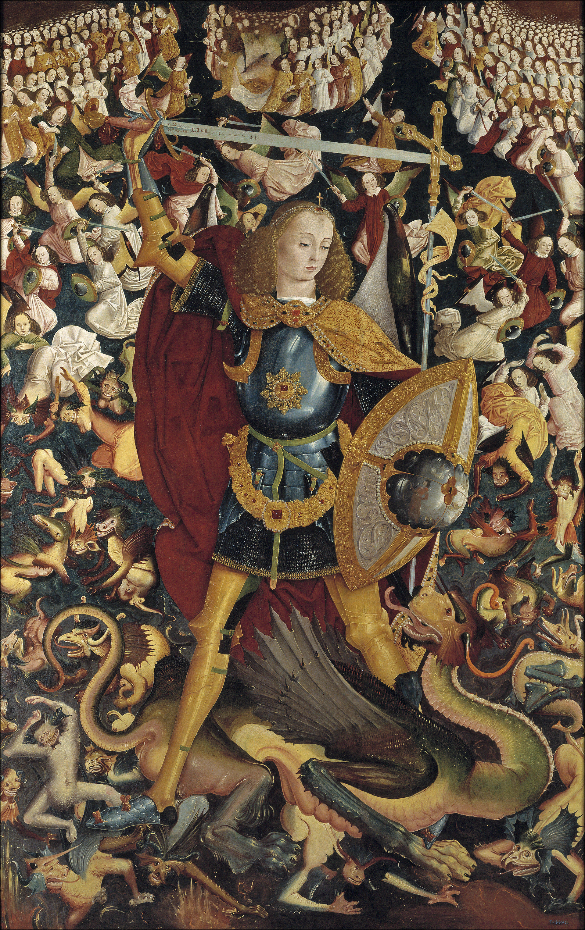 La obra representa a San Miguel Arcángel derrotando al dragón, símbolo del Pecado.